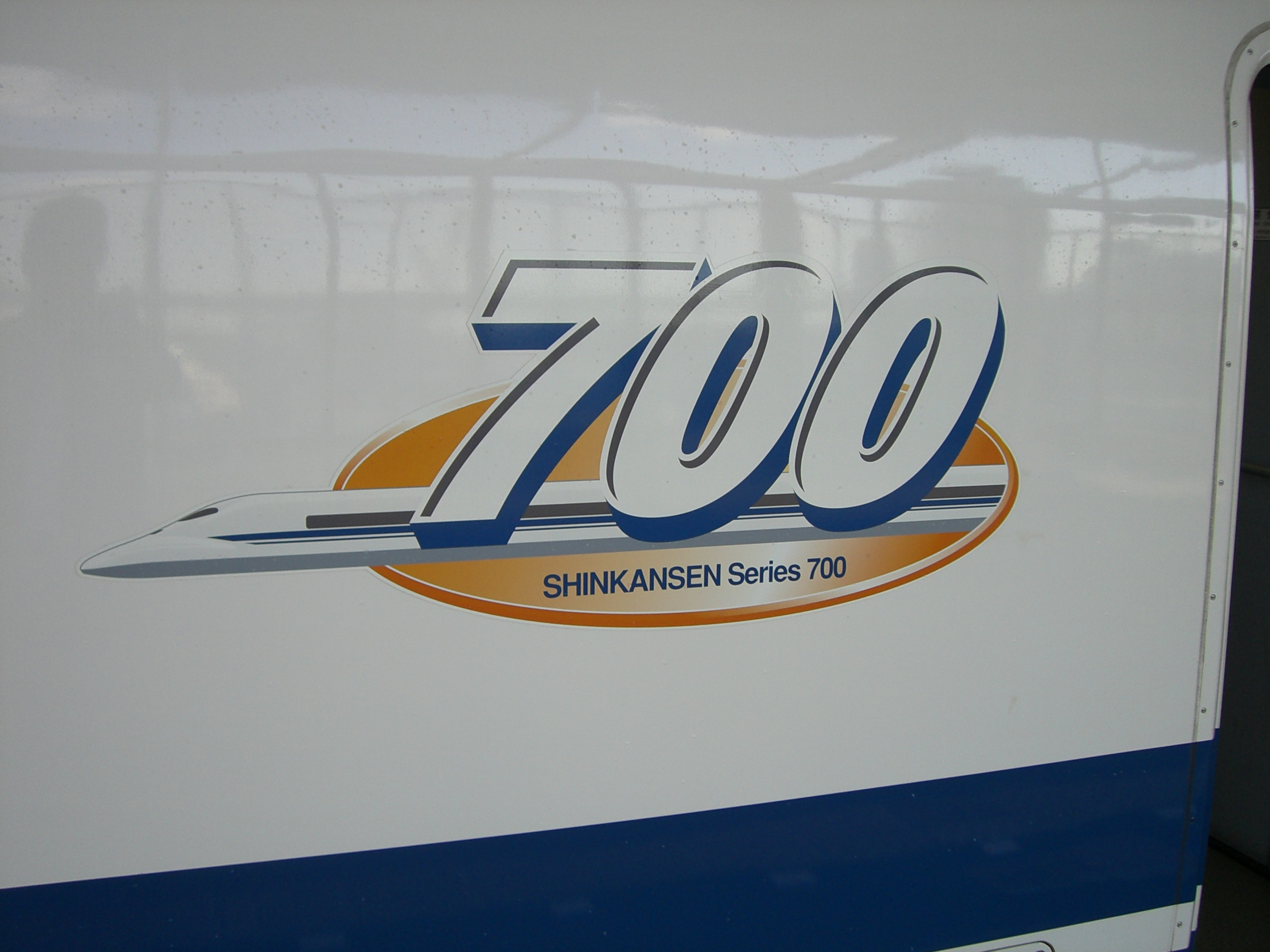 Shinkanen Series 700 symbol mark